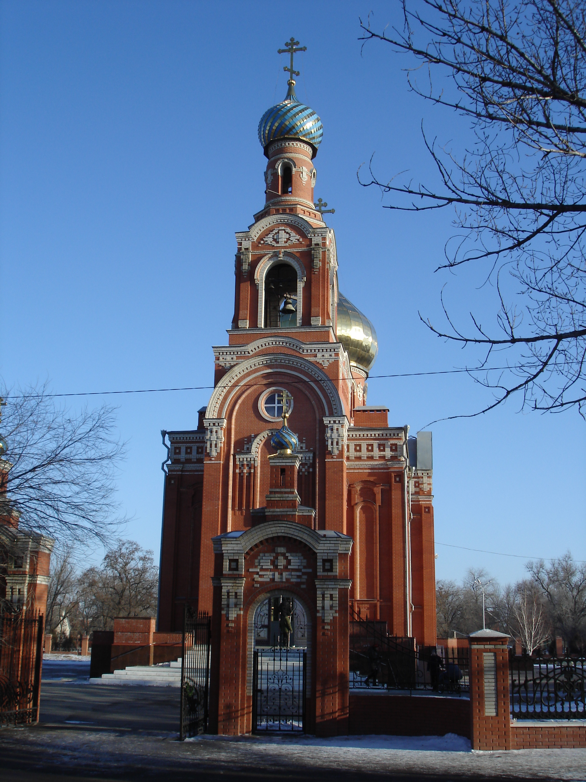 Свято-Покровская церковь в Каменске-Шахтинском, главный вход